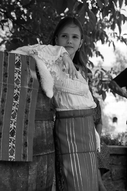 Косово и Метохија: Српска девојчица у народној ношњи метохијске области. Фотографије из пројекта "Корени душе". Фото:Дарко Дозет